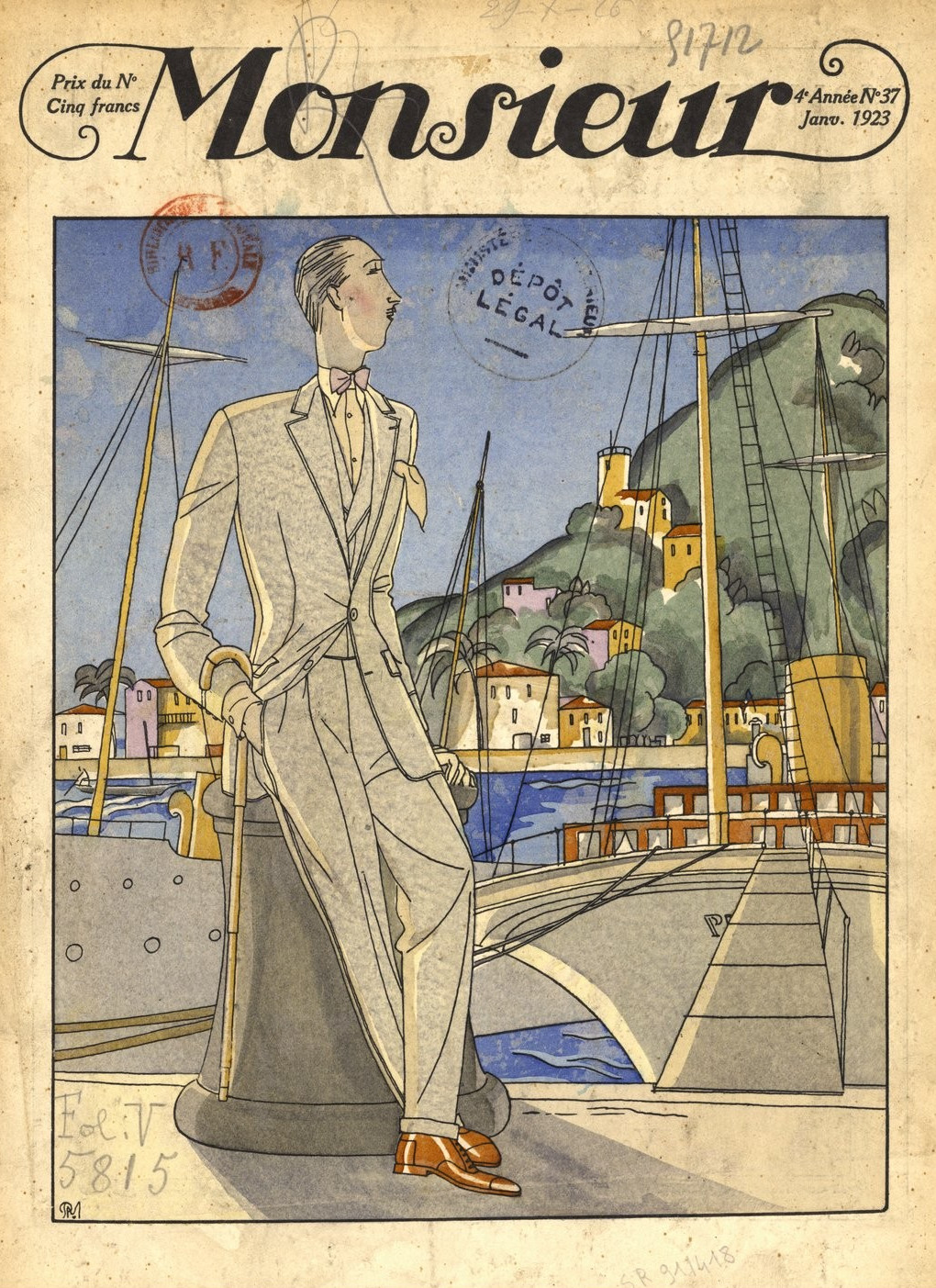 Couverture de la revue Monsieur n° 37, janvier 1923.